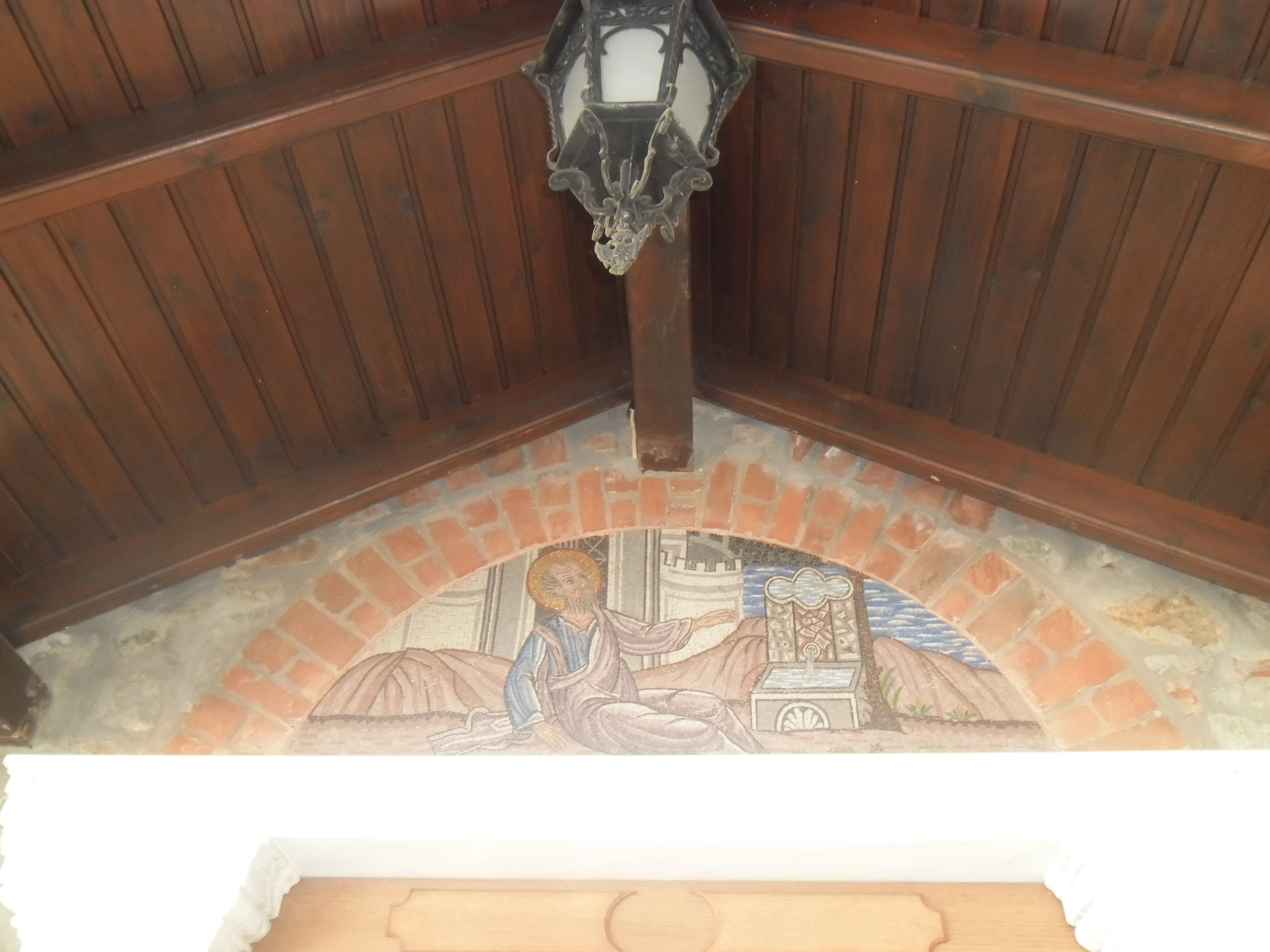 Thessaloniki